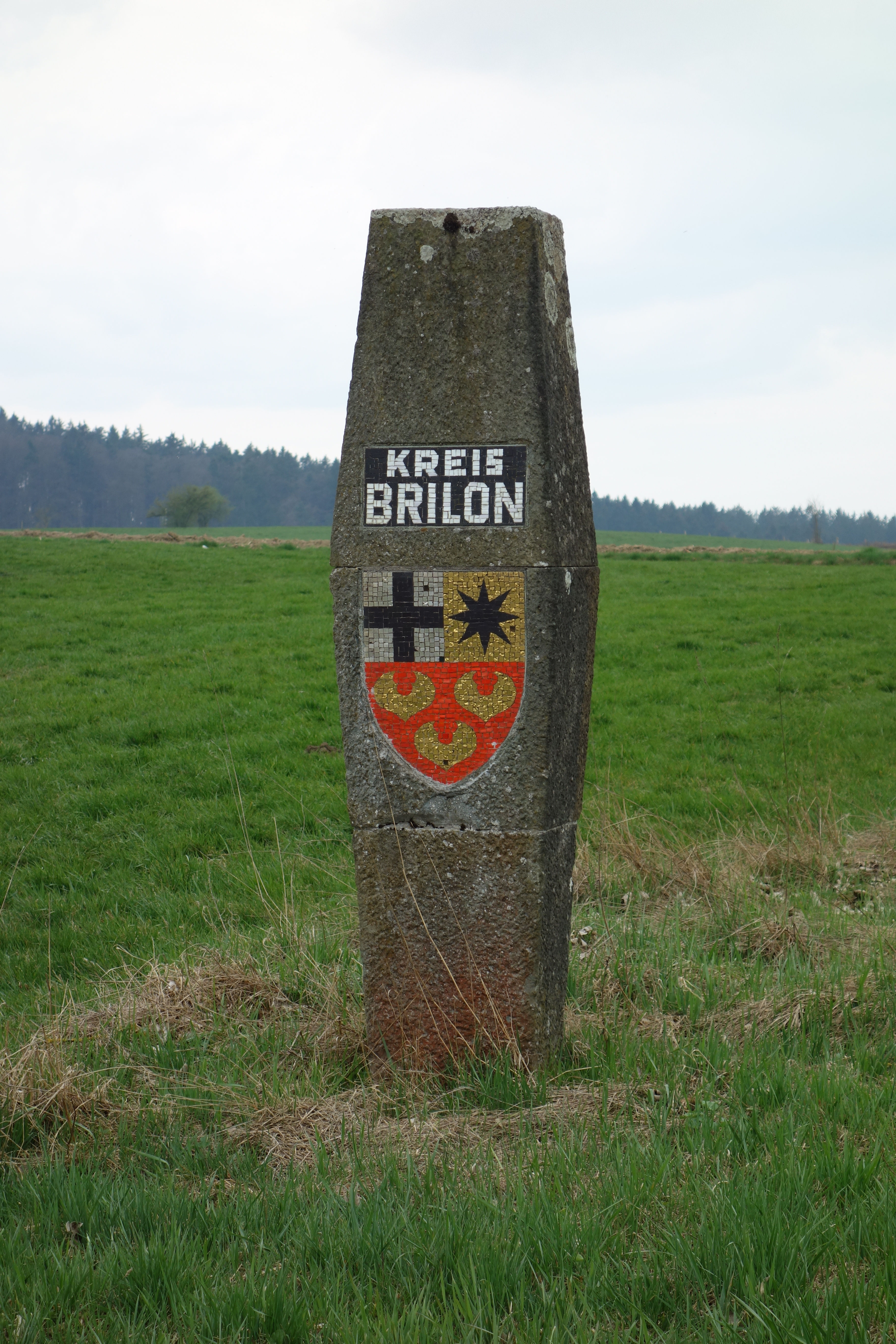 Grenzstein vom Kreis Brilon östlich Brilon-Alme.